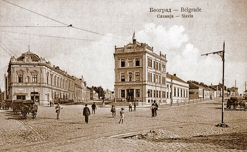 Trg Slavija u Beogradu